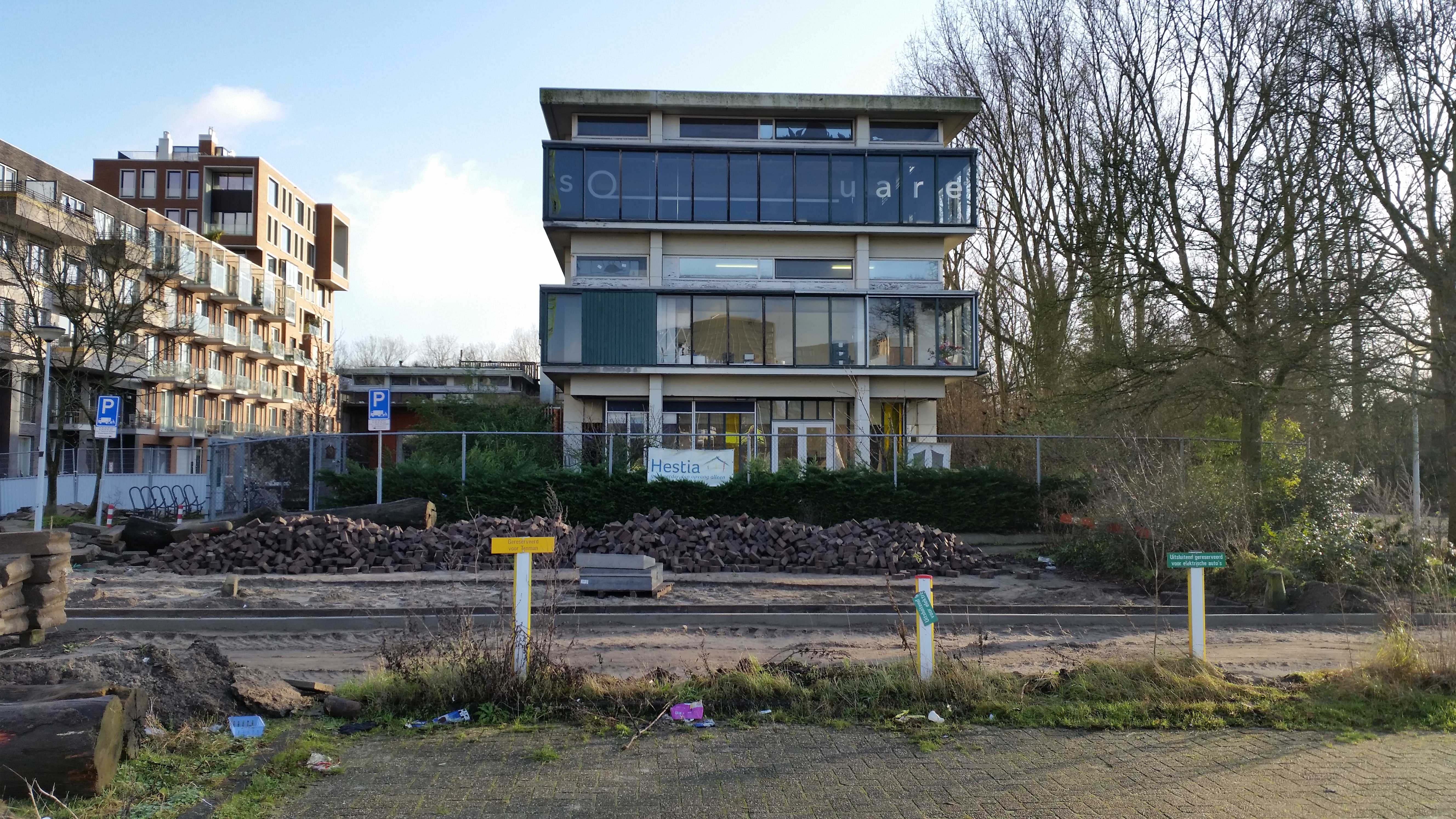 Impressie van Gaasterlandstraat 3-5, Amsterdam-Zuid. Gebouw uit 1971-1973, dat in eerste instantie in 2018/19 gesloopt moest worden, maar toen bewaard bleef om te bekijken of het een monument kon worden. Wordt vermoedelijk in 2020 alsnog gesloopt